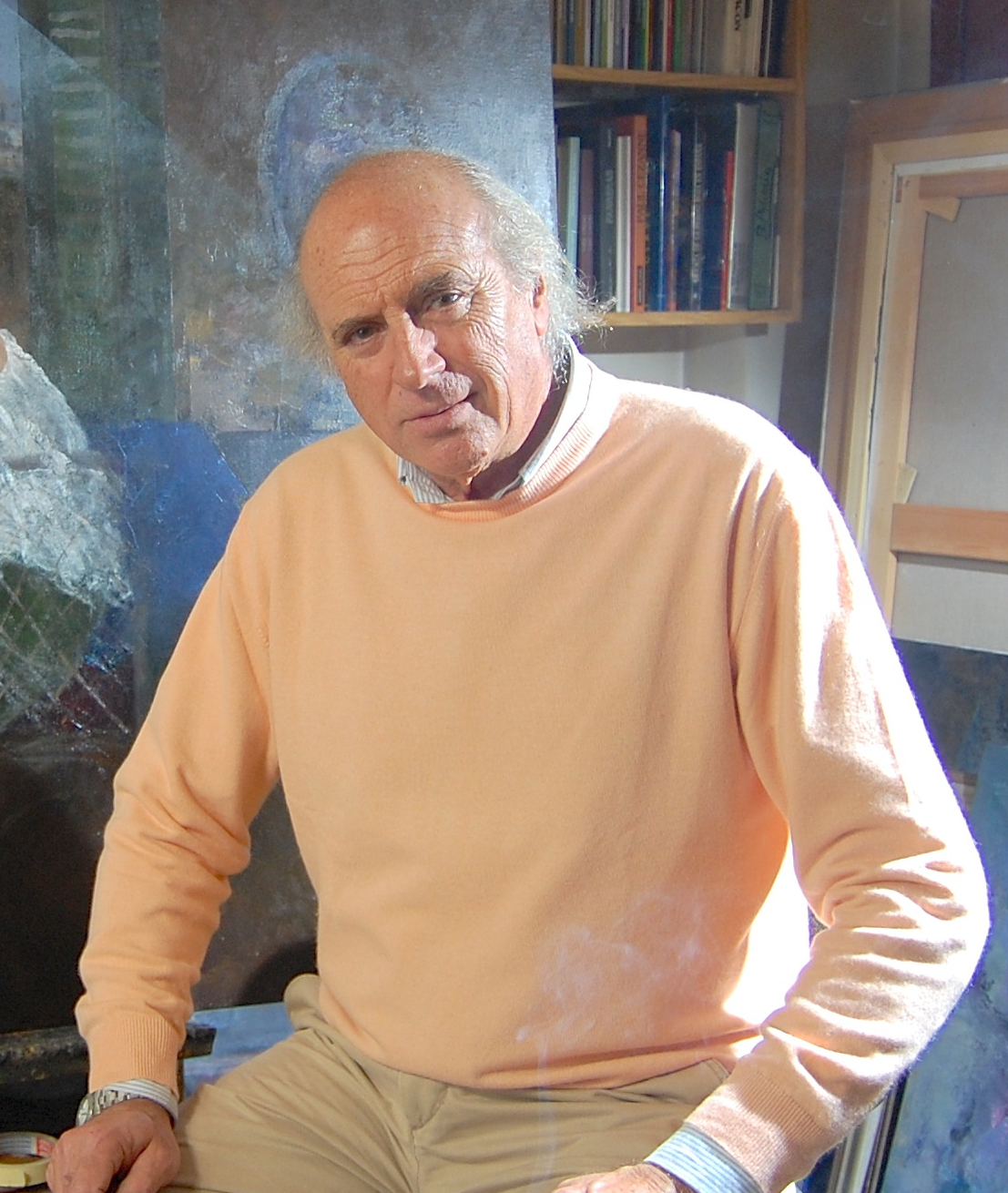 Don José Vega Ossorio